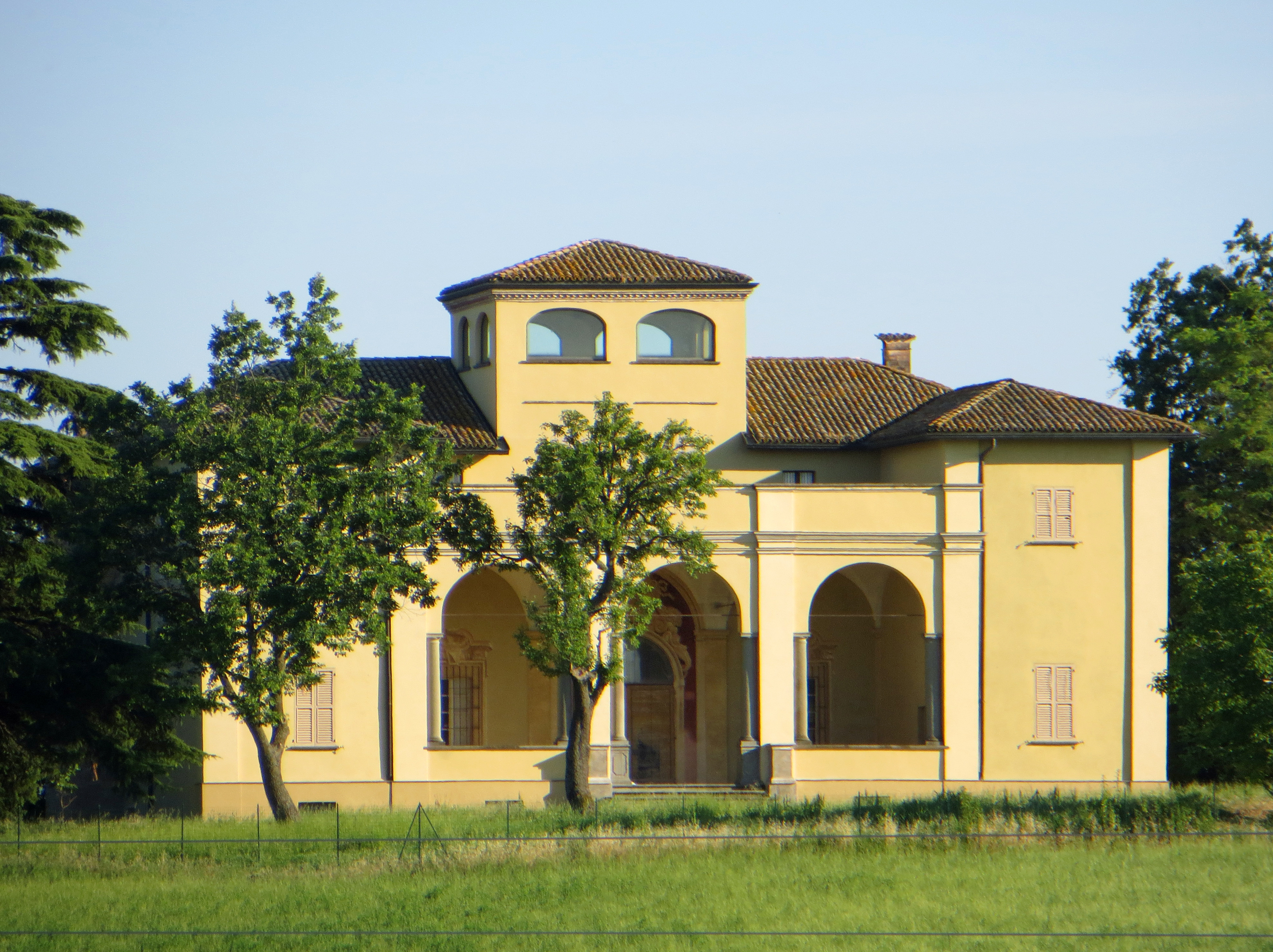 Villa Peroni (Arola, Langhirano) - facciata